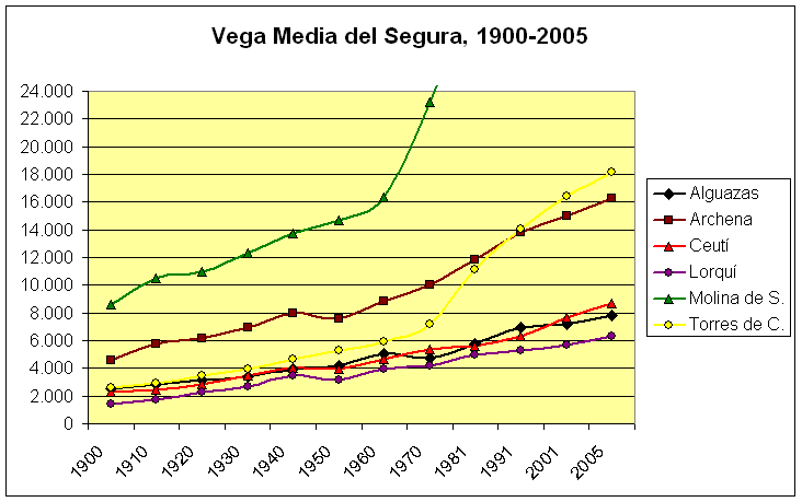 Población de Alguazas (línea negra) en el contexto de la comarca The population of the Vega Media del Segura region in Murcia, Spain, (1900-2005). Alguazas, Archena, Ceutí, Lorquí, Las Torres de Cotillas, and (only partially represented) Molina de Segura. Own work, given to PD. Source: Instituto Nacional de Estadística.